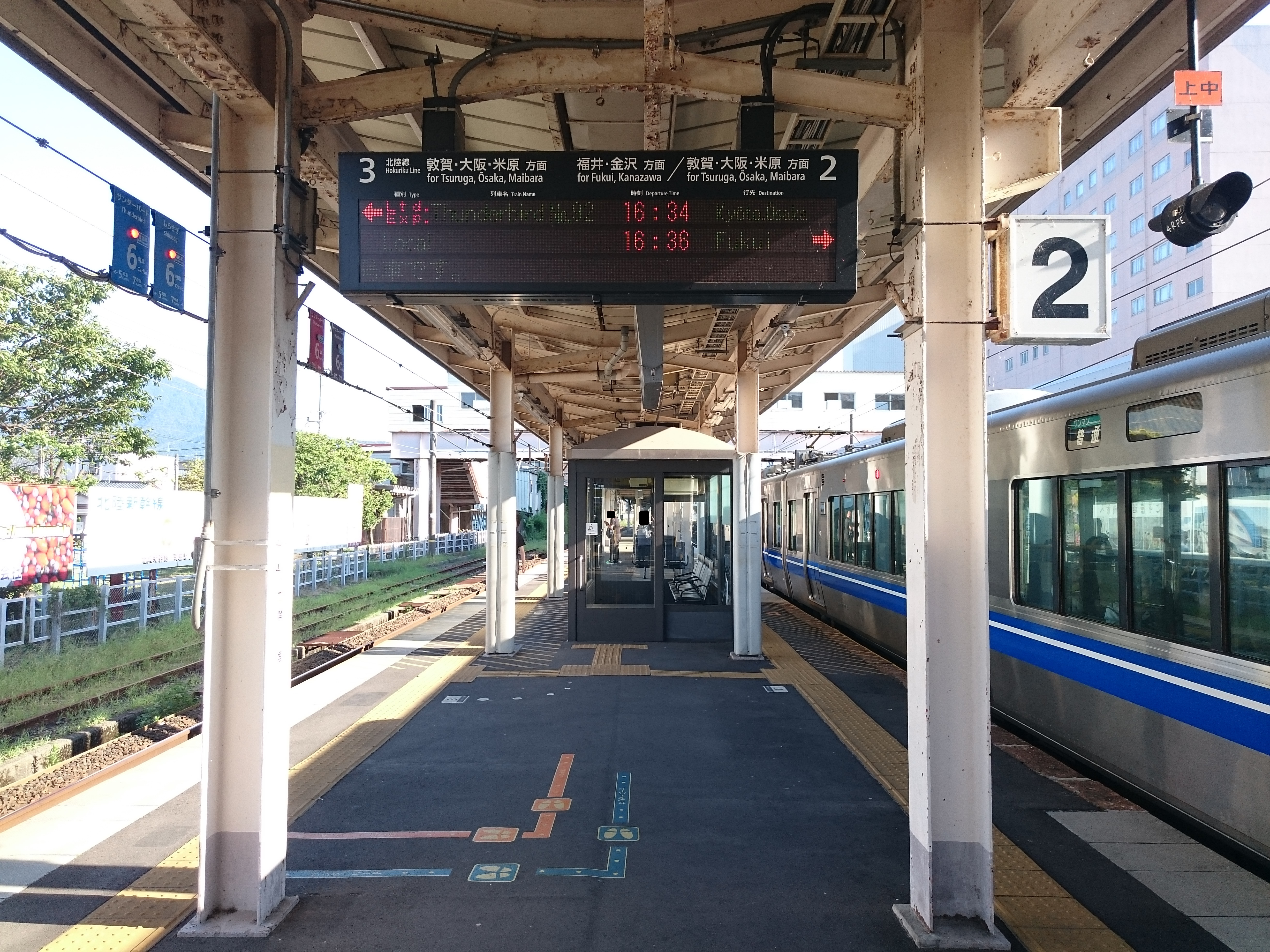 武生駅の2・3番のりば Sony Xperia Z3